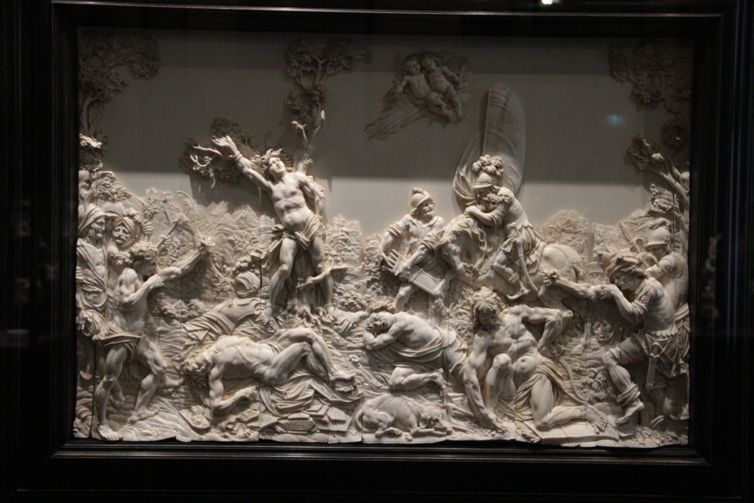 Martyrium des hl. Sebastian. Meister der Sebastiansmartyrien.1655 datiert. Inv. No.: KK 3654.